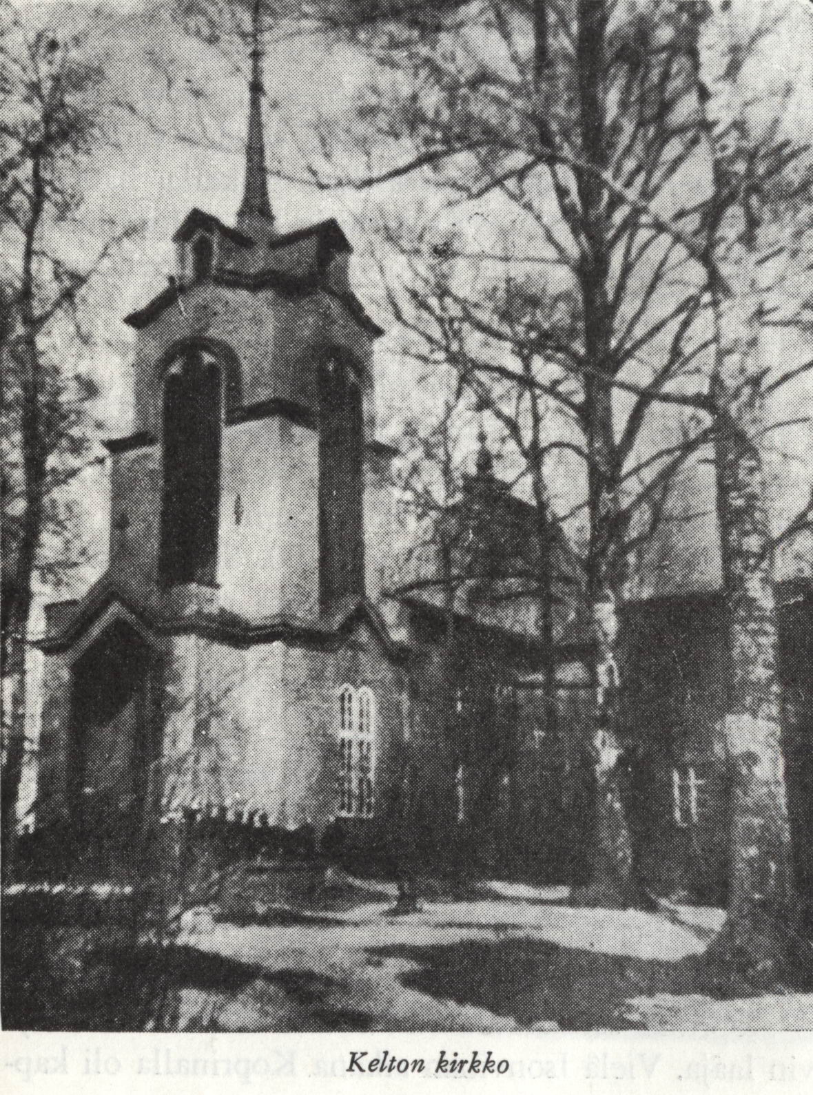 Старая Колтушская кирха святого Георгия.